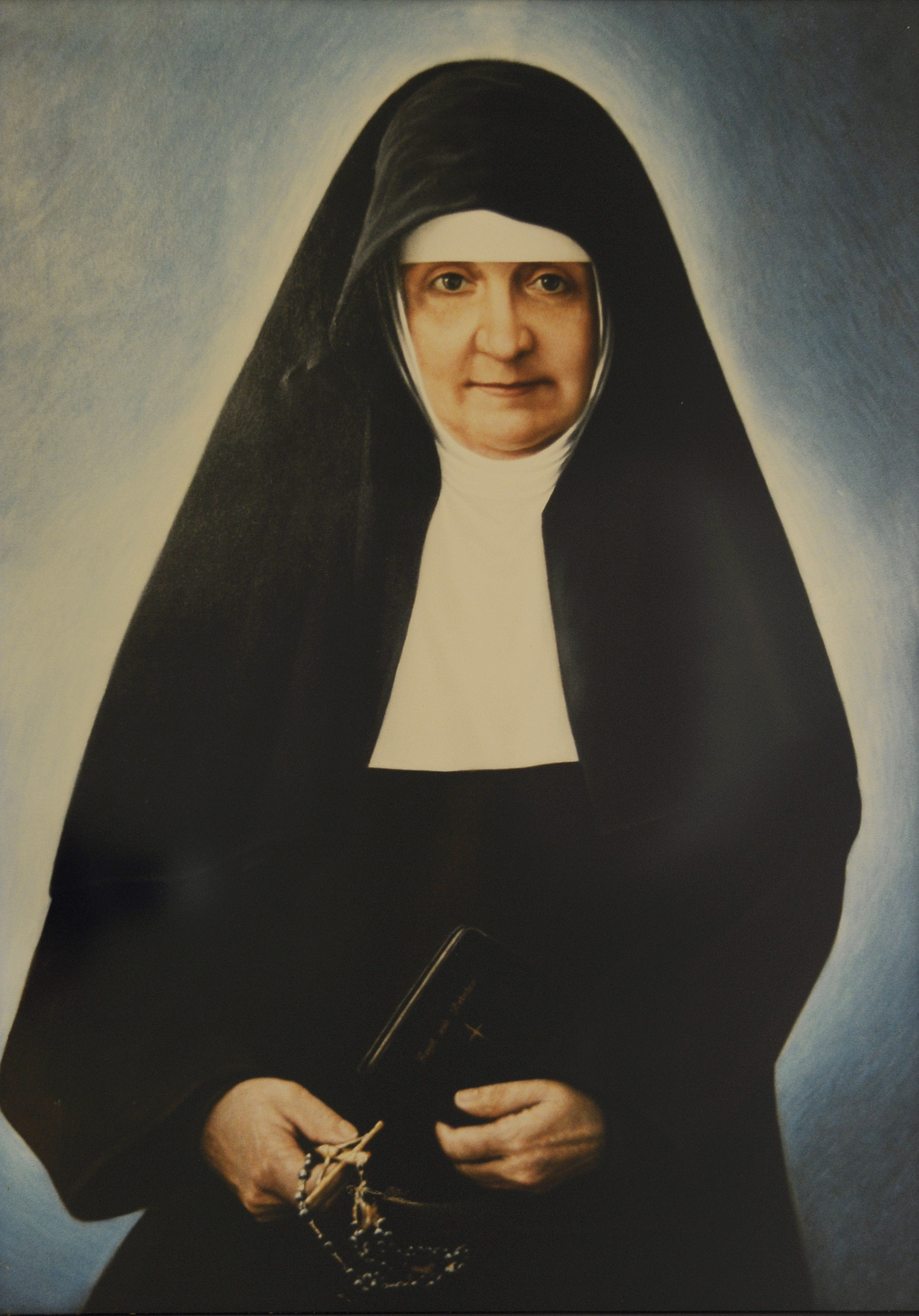 Bild von Mutter Maria Bernarda Bütler; das Original ist im Provinzhaus der Missions-Franziskanerinnen der Provinz Schweiz/Österreich in Frastanz/Vorarlberg.